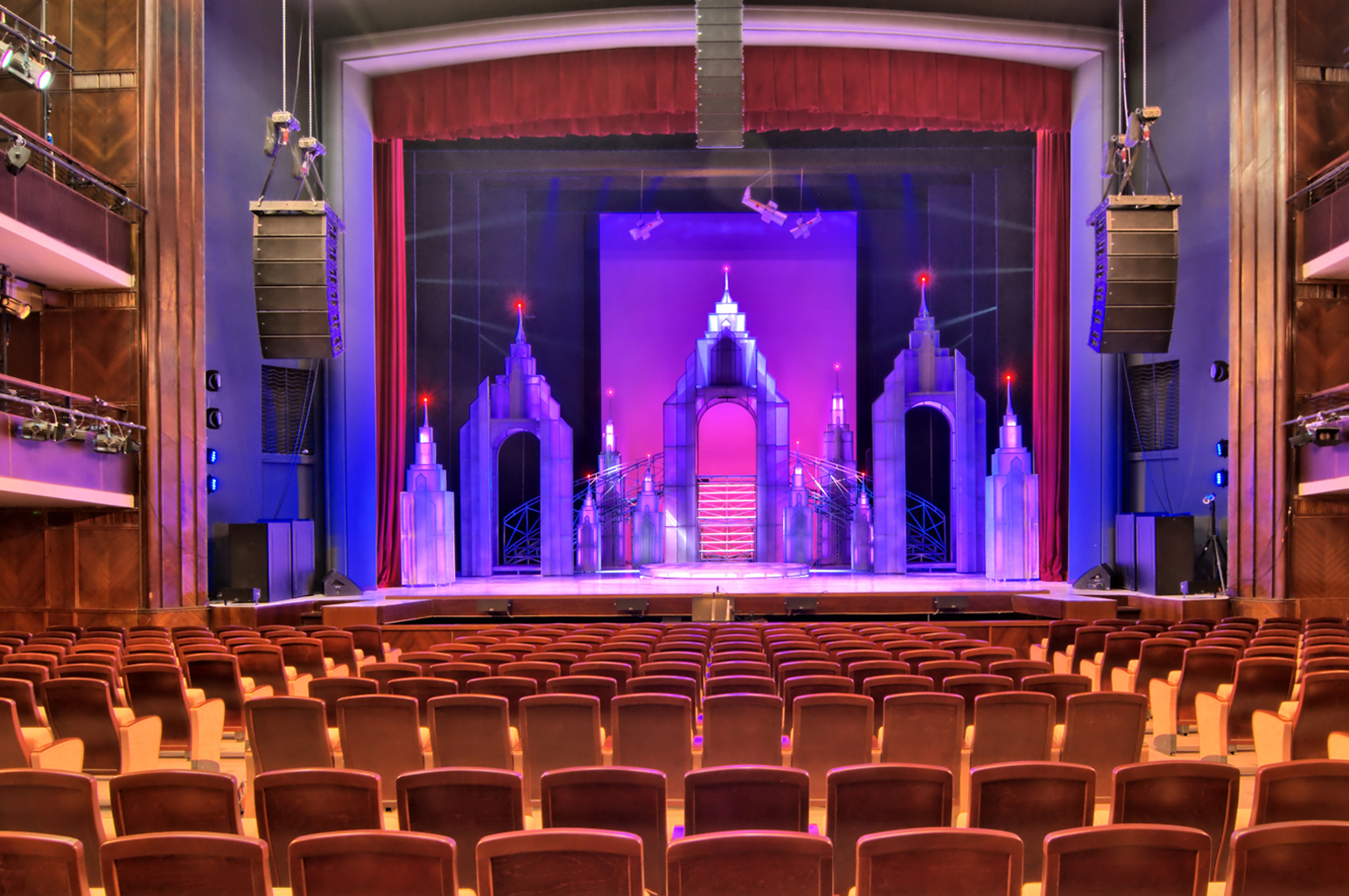 Декорации на сцене